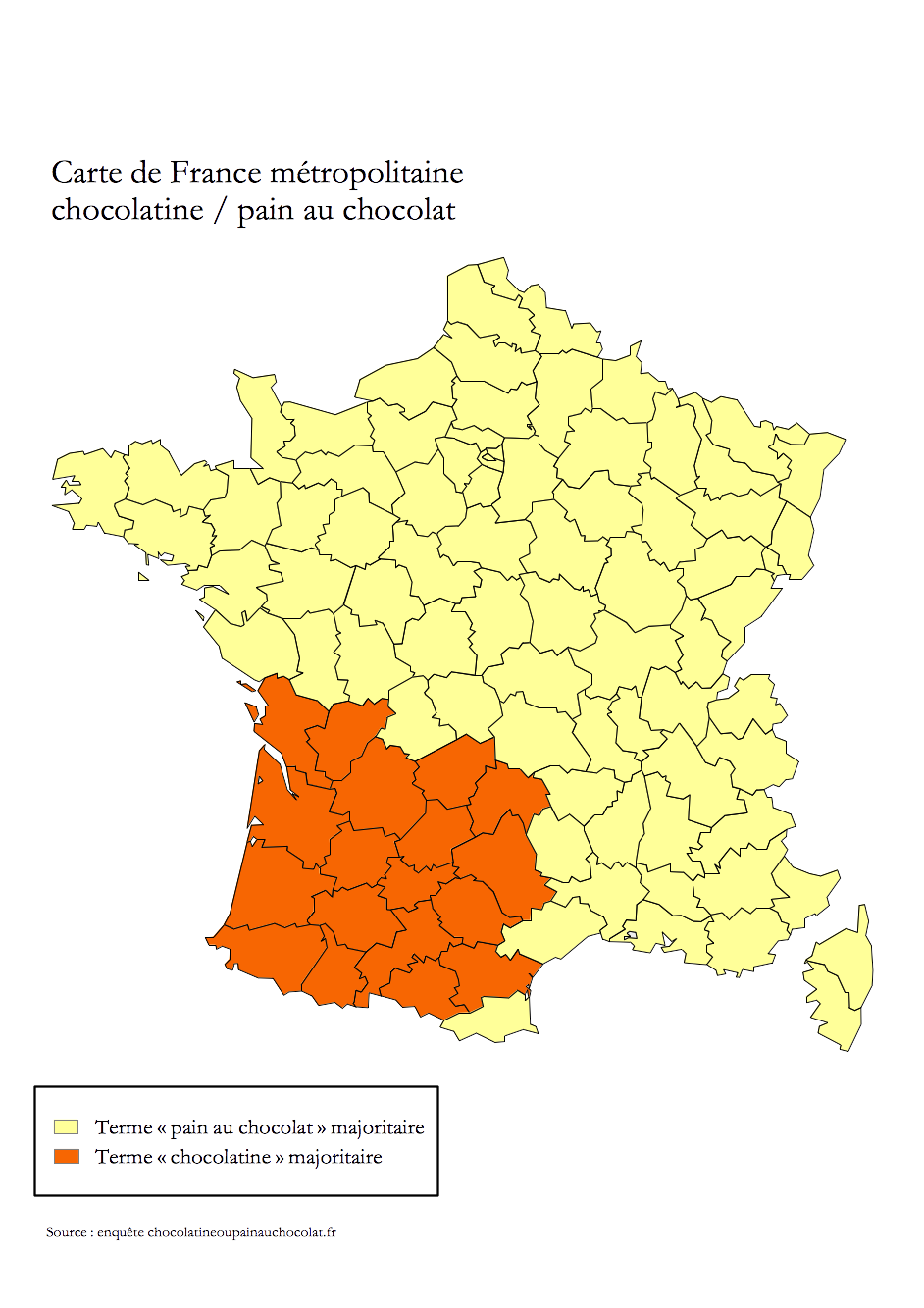 Répartition géographique des termes "chocolatine" et "pain au chocolat" en France métropolitaine (par département) selon les résultats d'un sondage